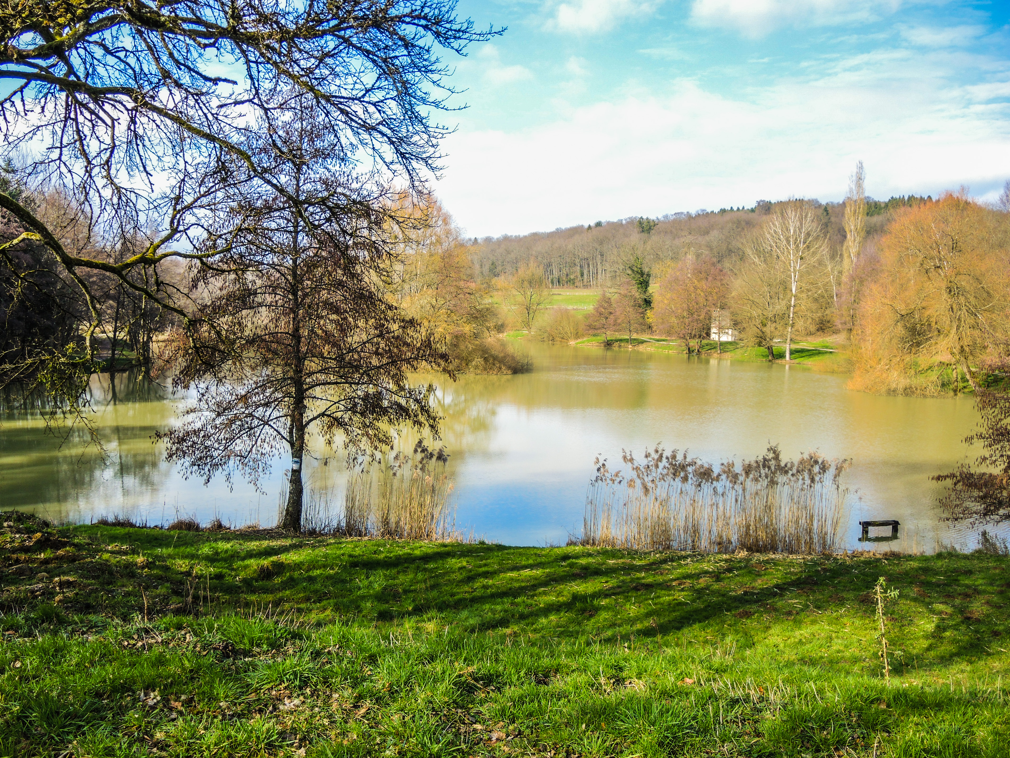 Etang de Beutal. Doubs